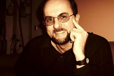 Bogusław Kołcz (ur. 17 grudnia 1963 w Nowym Sączu) - polonista, współautor podręczników szkolnych, publicysta oświatowy, profesor oświaty od 14.10.2008 r.